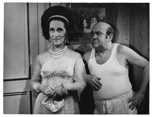 Noemí Manzano y Emilio Vidal con pijama, en la película La guita (1970).